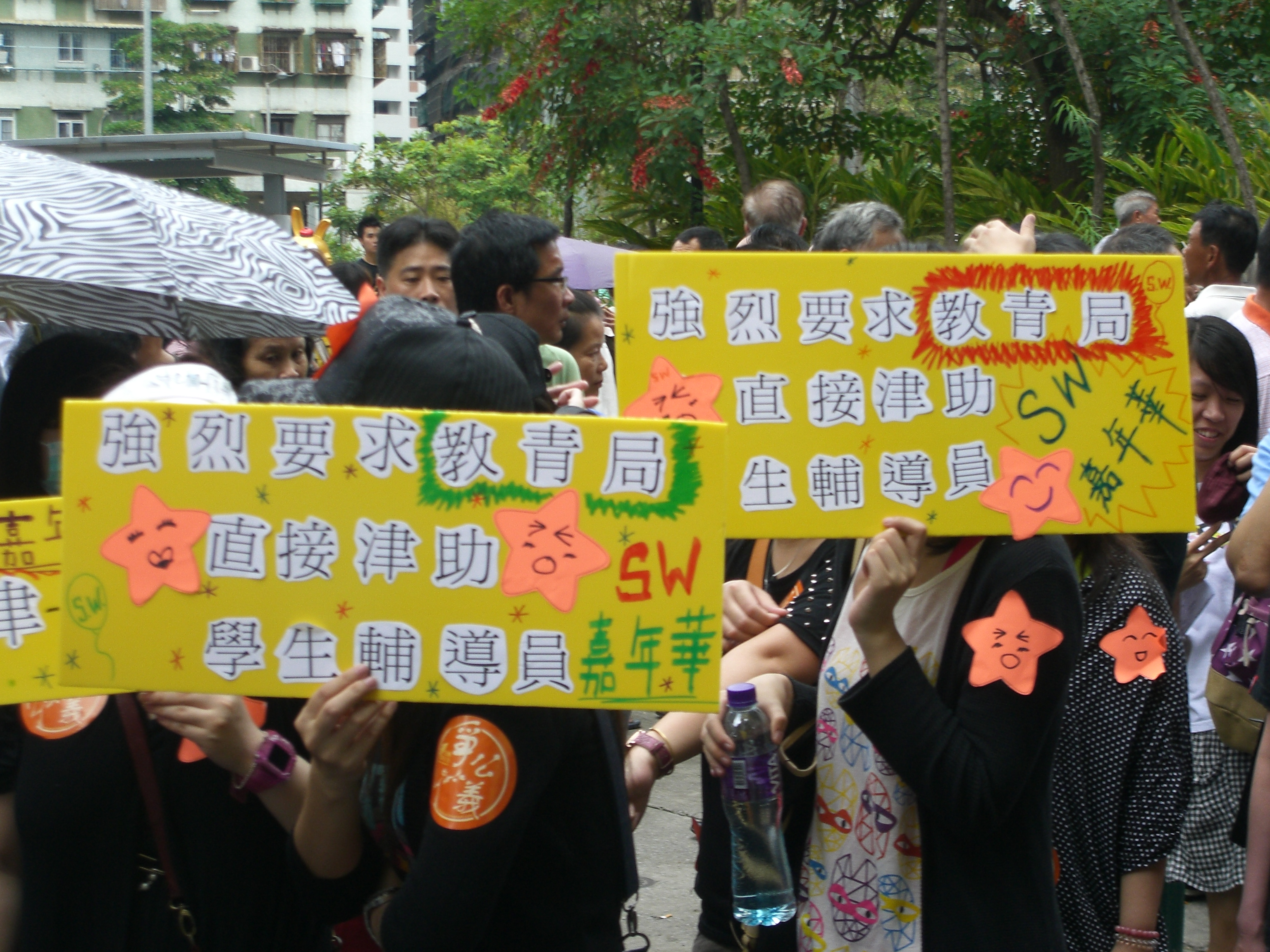 2011年澳門勞動節遊行